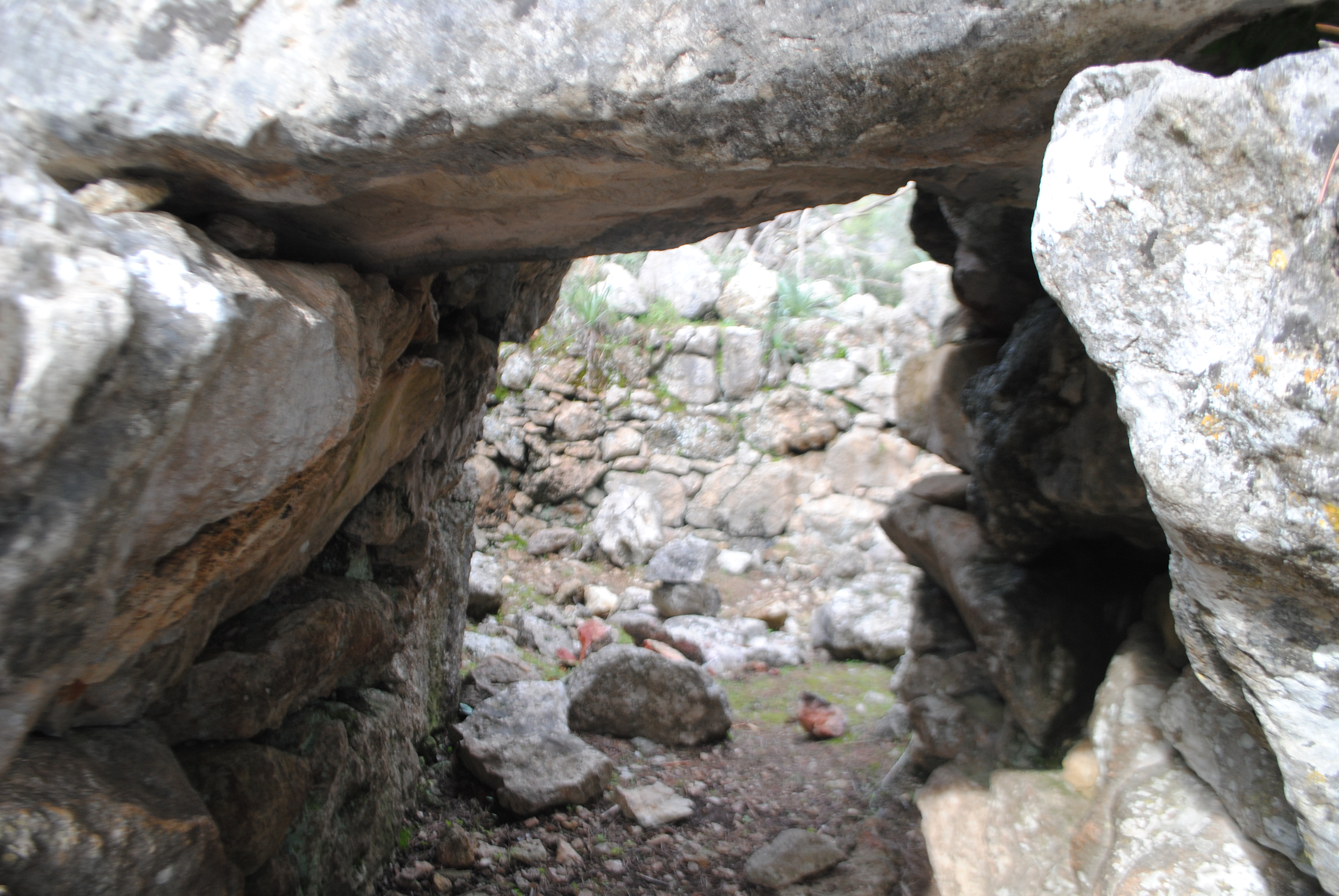 Portal d'entrada al talaiot de Coma-Sema